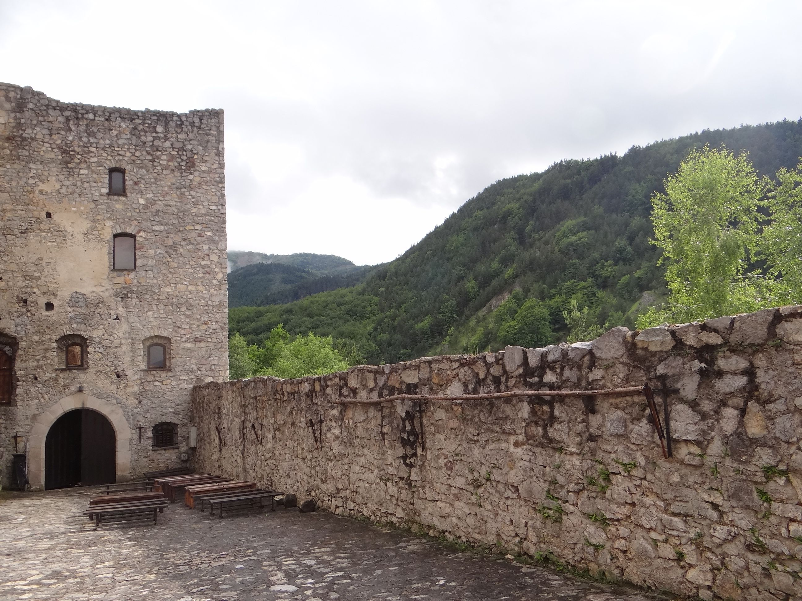 Hrad Strečno